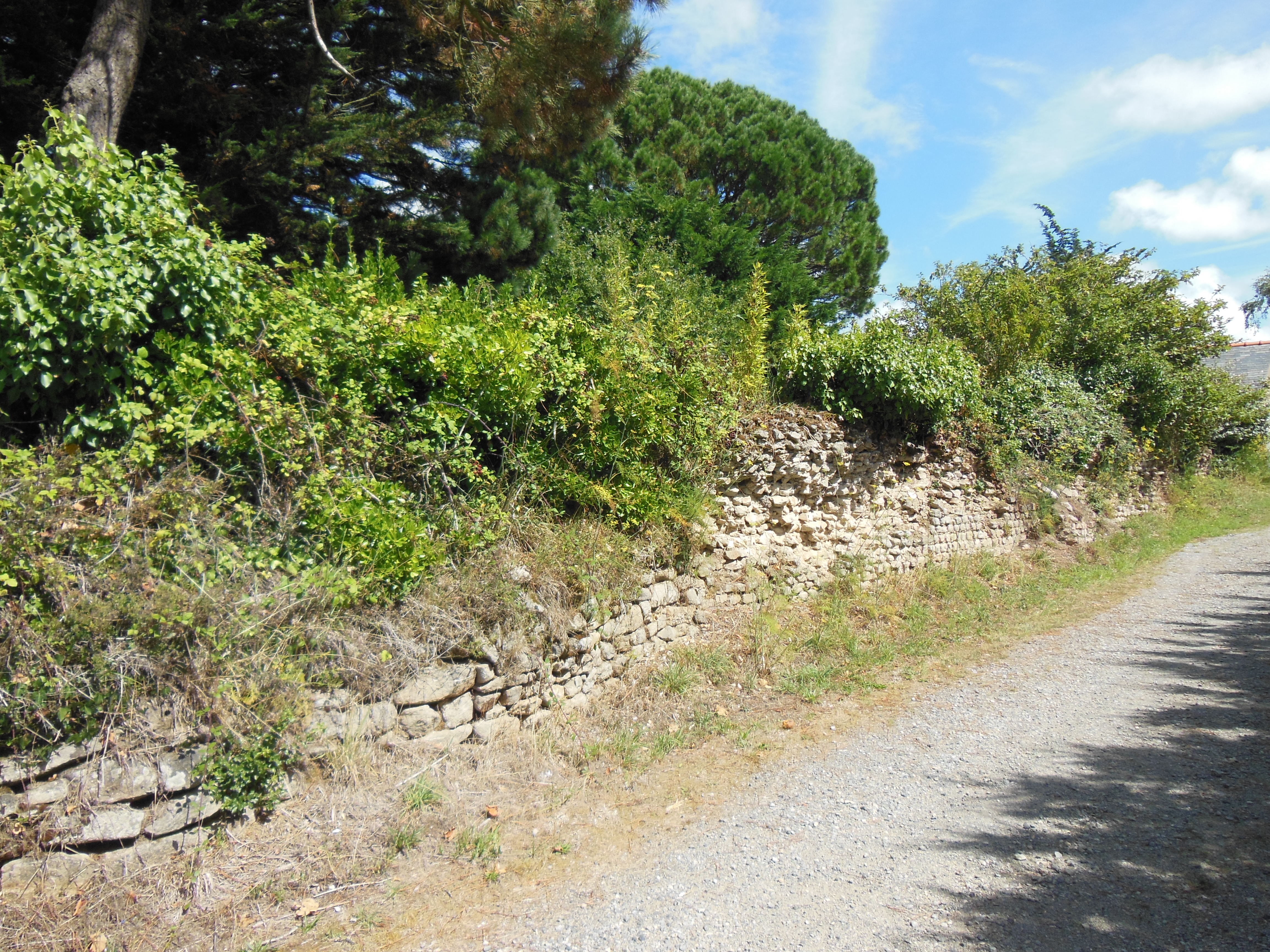 Mur gallo-romain de Clis, Ier siècle, quartier du Requer (commune de Guérande, Loire-Atlantique, France)